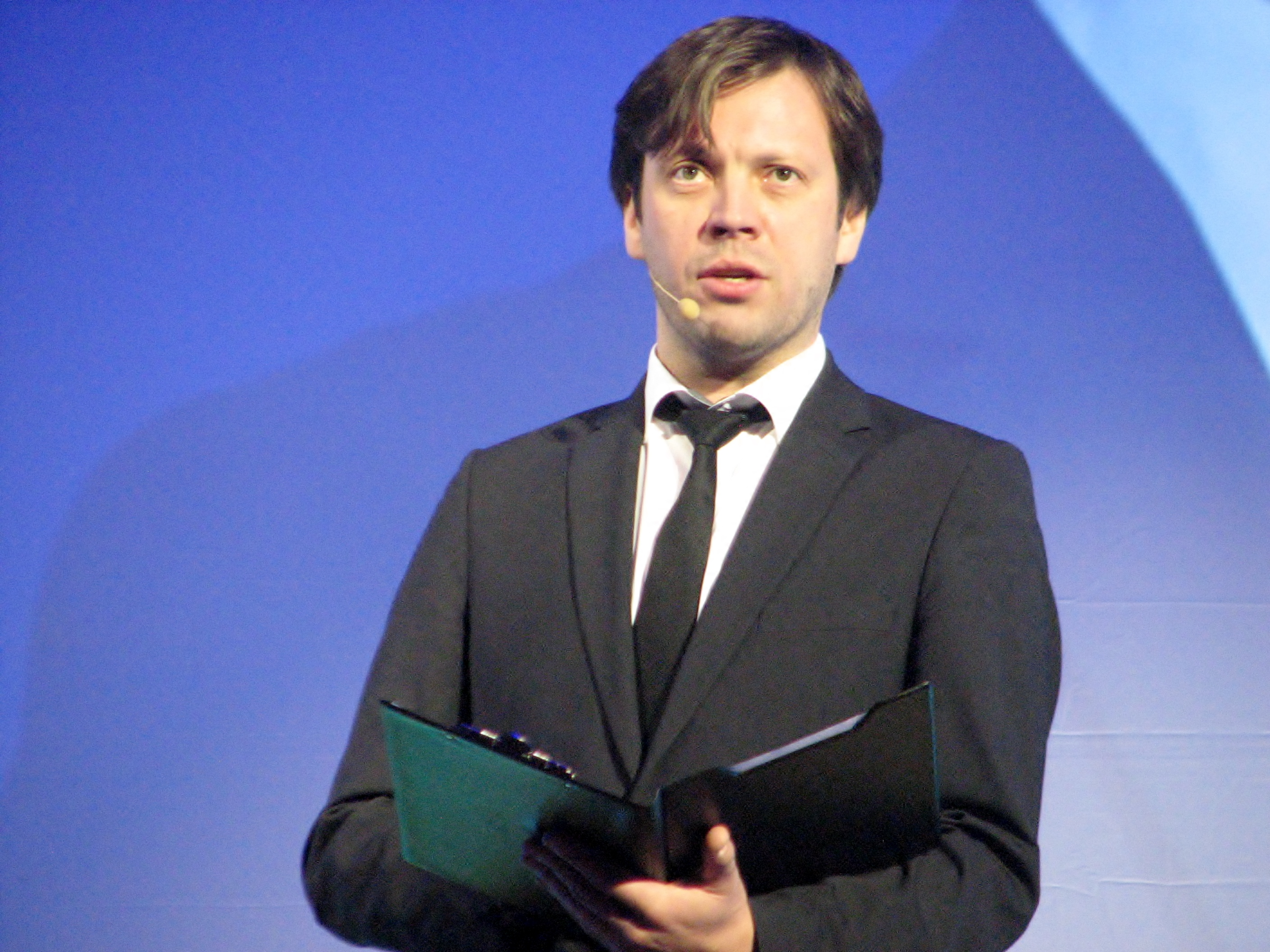 Mait Malmsten esinemas Estonia kontserdisaalis konverentsil "ERSP 25 – milleks meile erakonnad?"